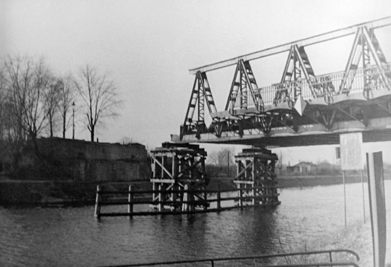 Berlin, Teltowkanal, Baumschulenbrücke, Ruine ADN-ZB Funck-go Berlin Die im II.Weltkrieg zerstörte Baumschulenbrücke über den Teltowkanal. Aufn. Januar 1950 5121-50 Information added by Wikimedia users.